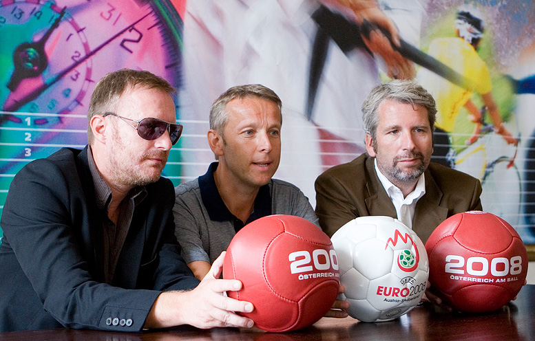 Stermann (rechts) mit Partner Grissemann (links) bei Dreharbeiten zu einer "Willkommen Österreich"-Folge, mit dem österreichischen Sportstaatssekretär Reinhold Lopatka (mittig).